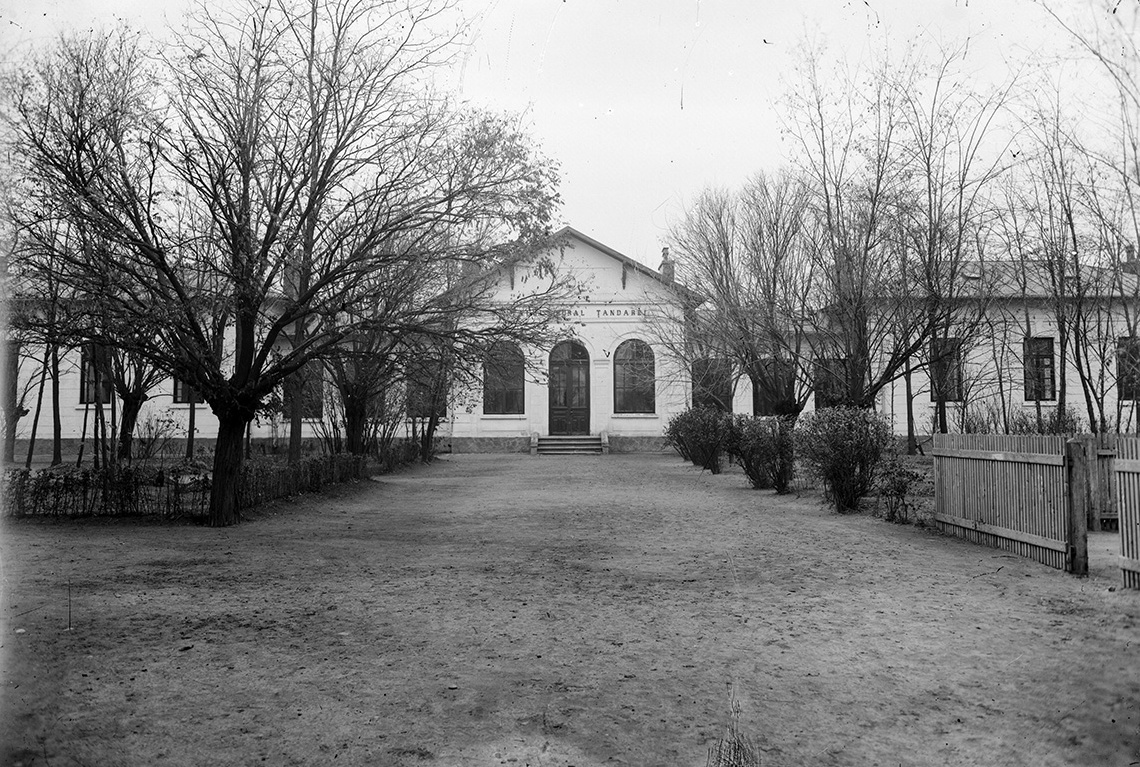 Spitalul Rural Țăndărei